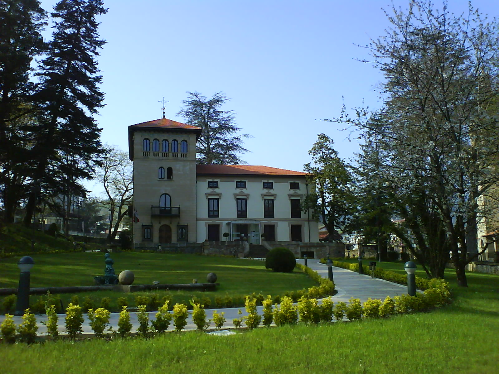 Ayuntamiento de Berriz, Vizcaya (País vasco) (España).